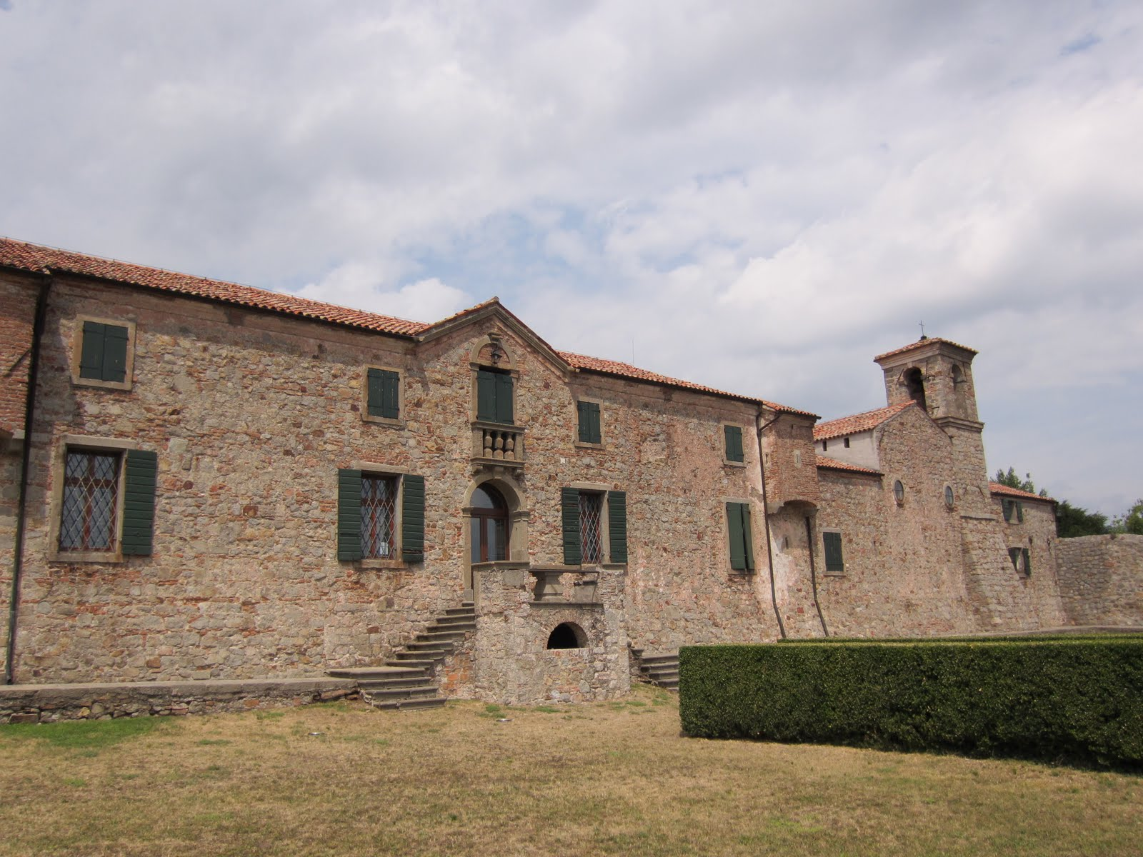 Ehemaliges Kloster auf dem Monte Gemola, Baone, Venetien (Italien)